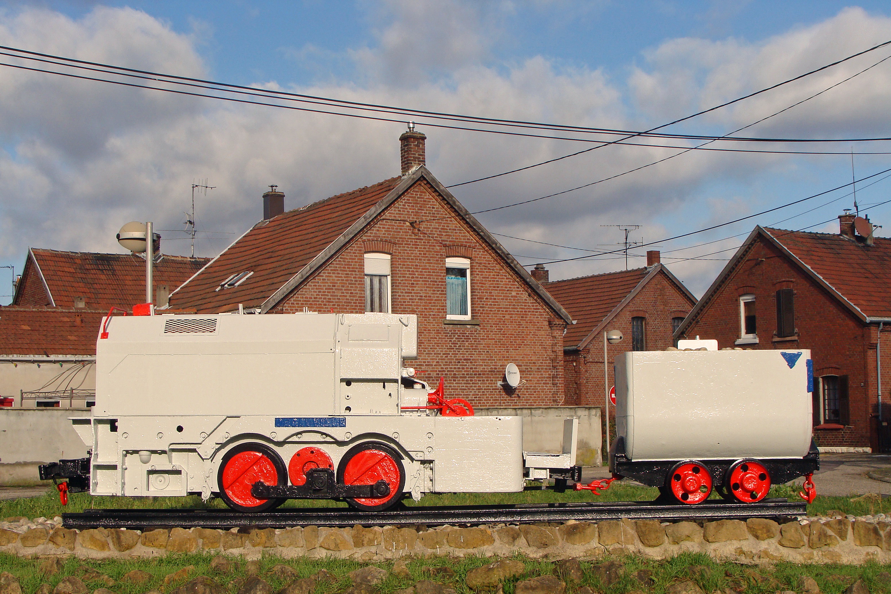 Locomotive de la mine, place du puits3, L'Hôpital (Moselle)